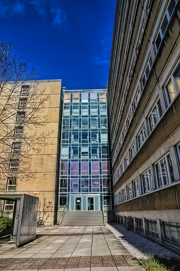 Gebäude der CampusBibliothek II